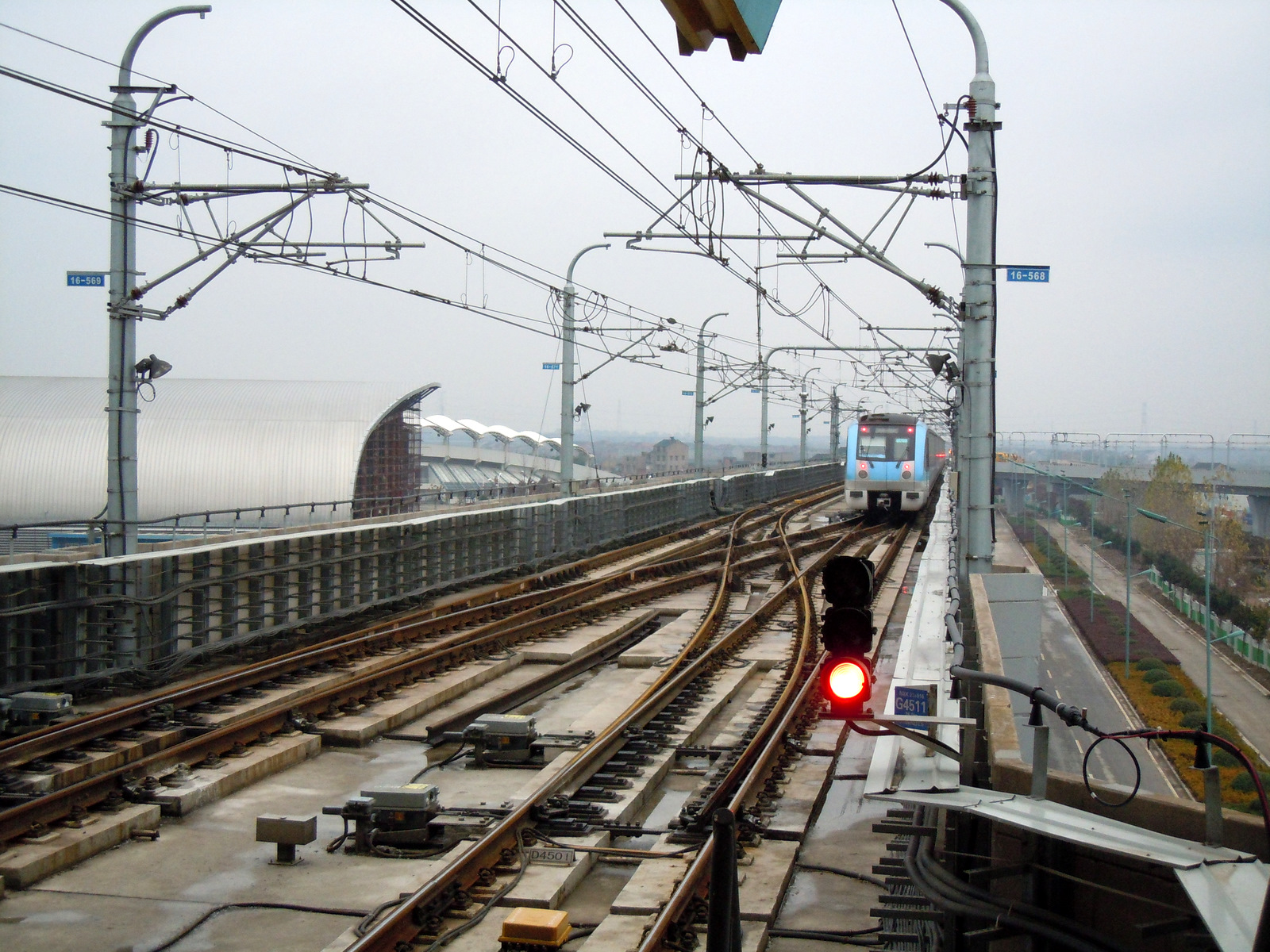 南京地铁1号线南延线南端终点